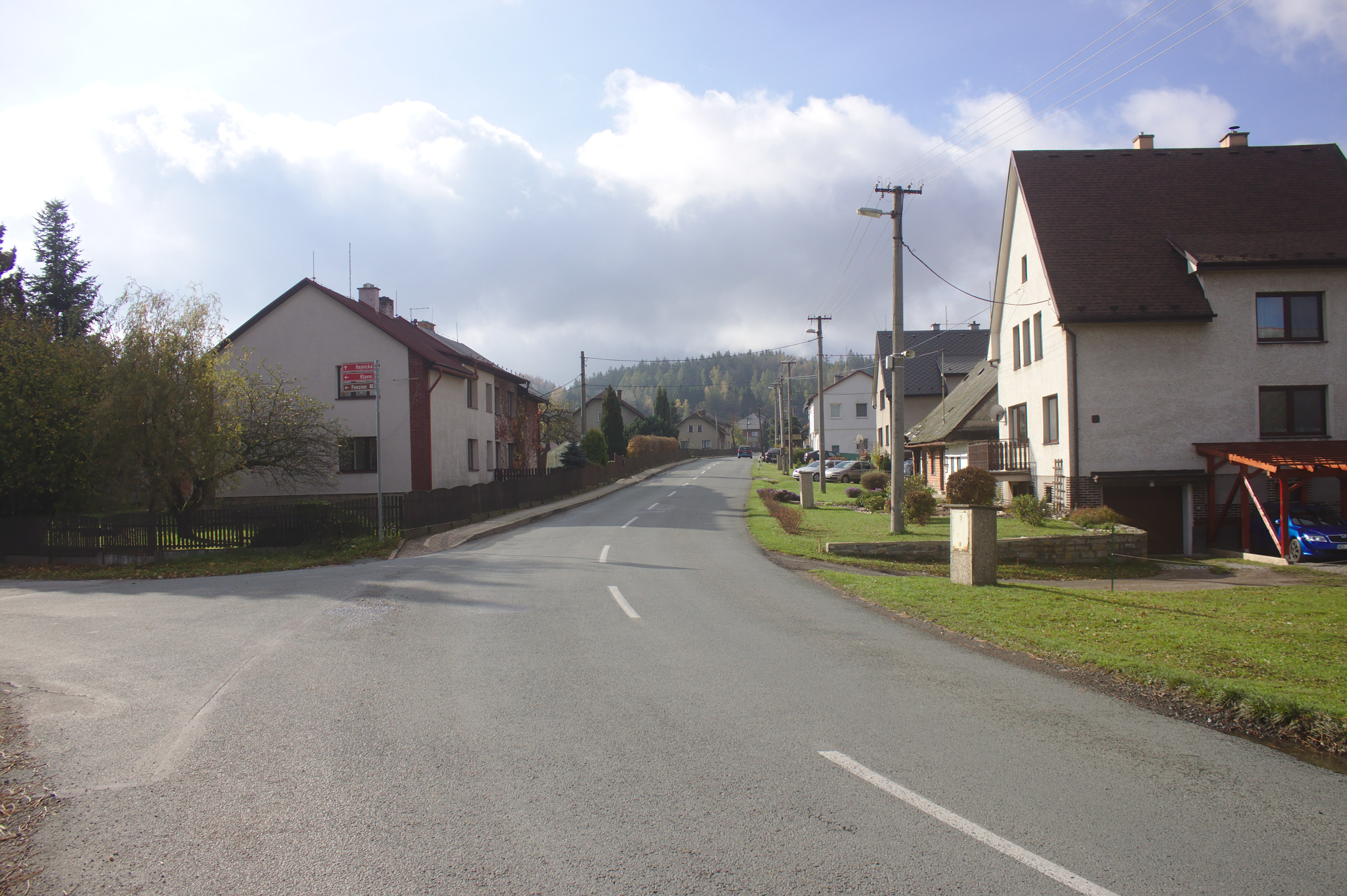 Hlavní silnice v Dlouhoňovicích u Žamberka